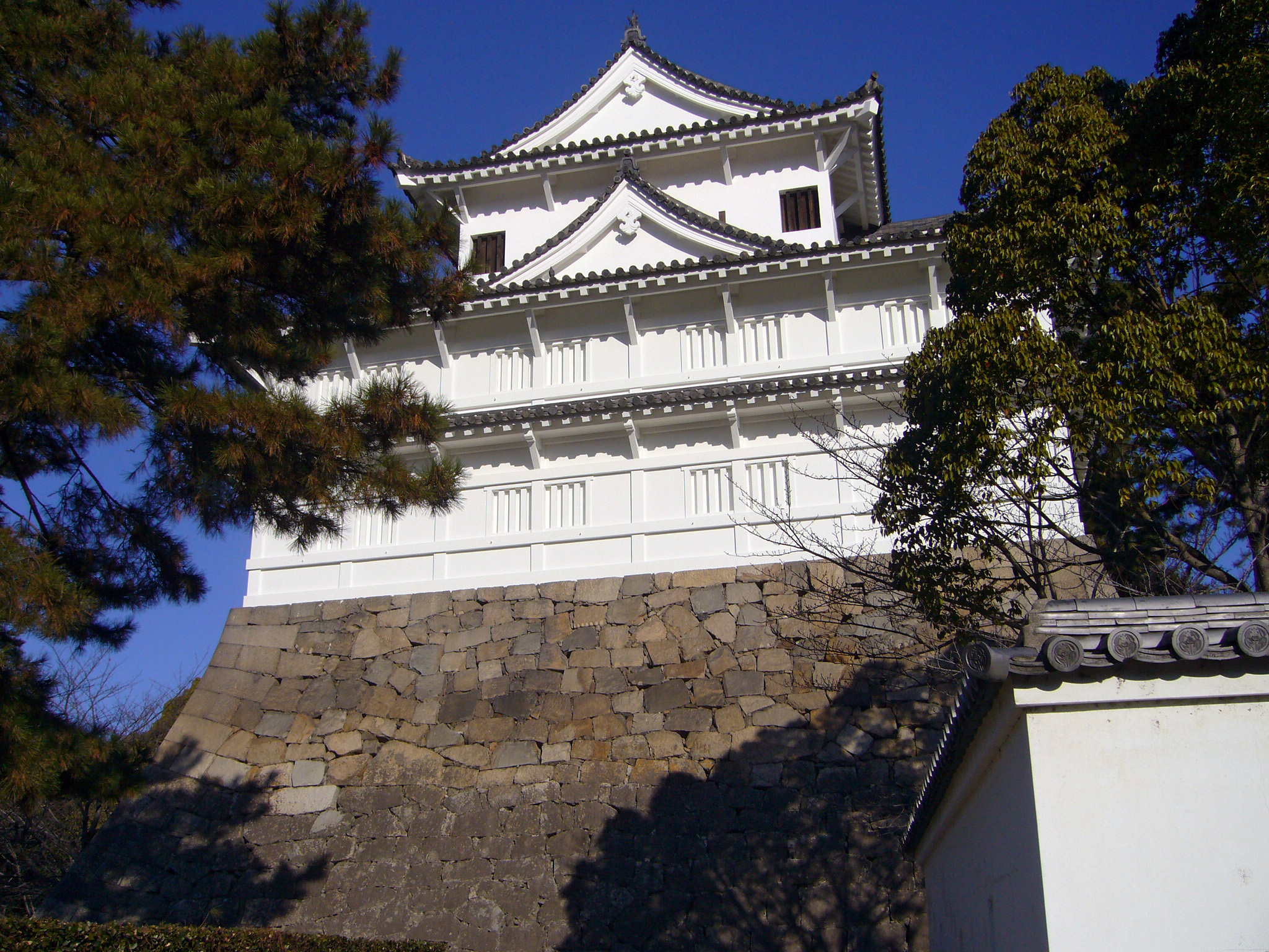 Fukuyama Castle "Fushimi-yagura" in Fukuyama, Hiroshima prefecture, Japan